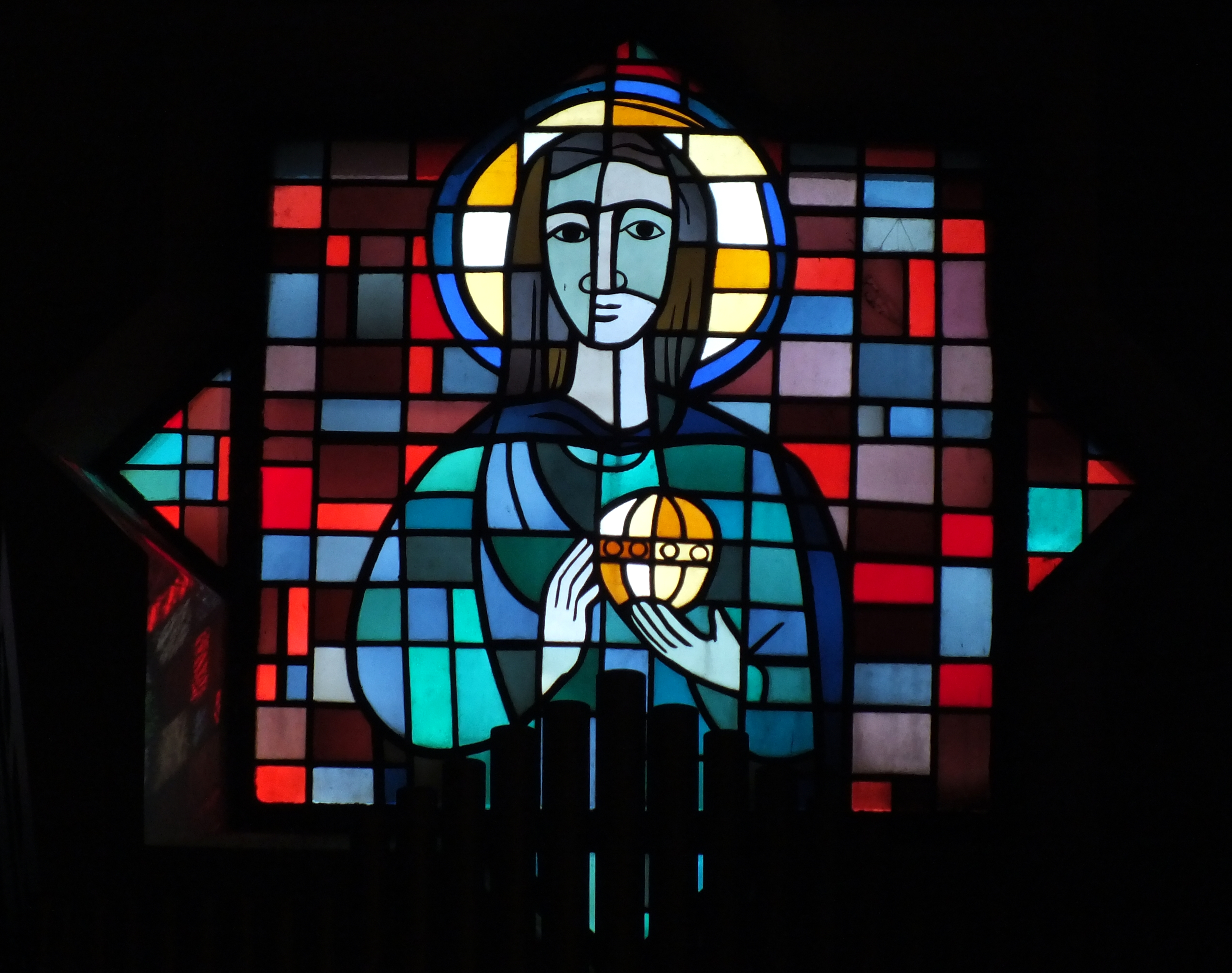 Kirche Maria Magdalena, Berlin-Niederschönhausen: Fenster in Höhe der Orgelempore, Maria Magdalena dartellend